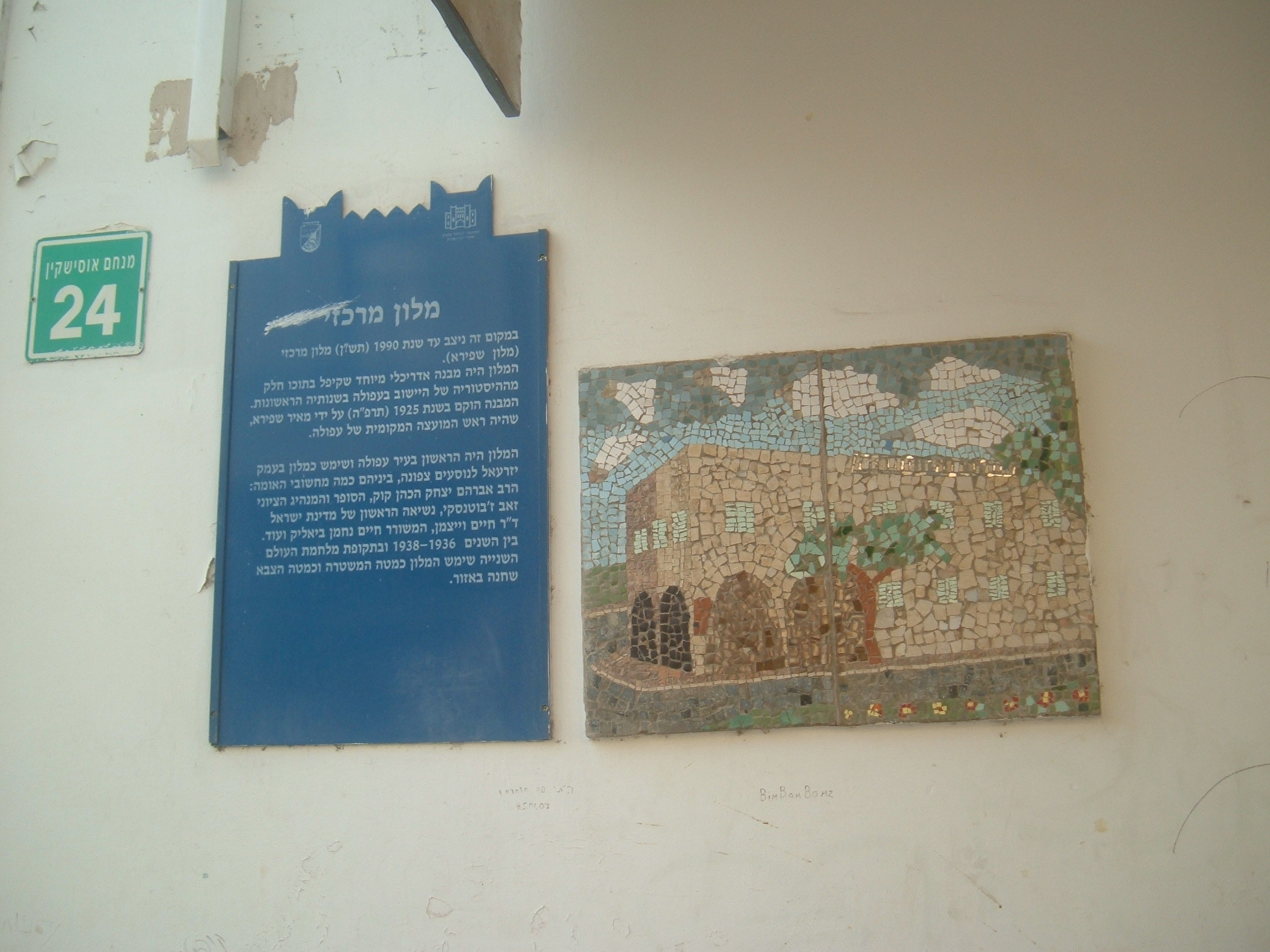 memorial plaque on the building where the central hotel was in afula. לוחית זיכרון על הבניין בשדרות ארלוזורוב בעפולה שהיה בעבר "מלון מרכזי" ולידה פסיפס המראה את בניין המלון בטרם נהרס ונבנה מחדש